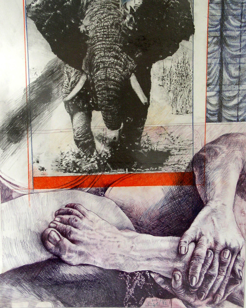 Peter Sorge, Elefantentraum, 1992, Farb- und Graphitstift auf Karton, 70,5 x 50 cm